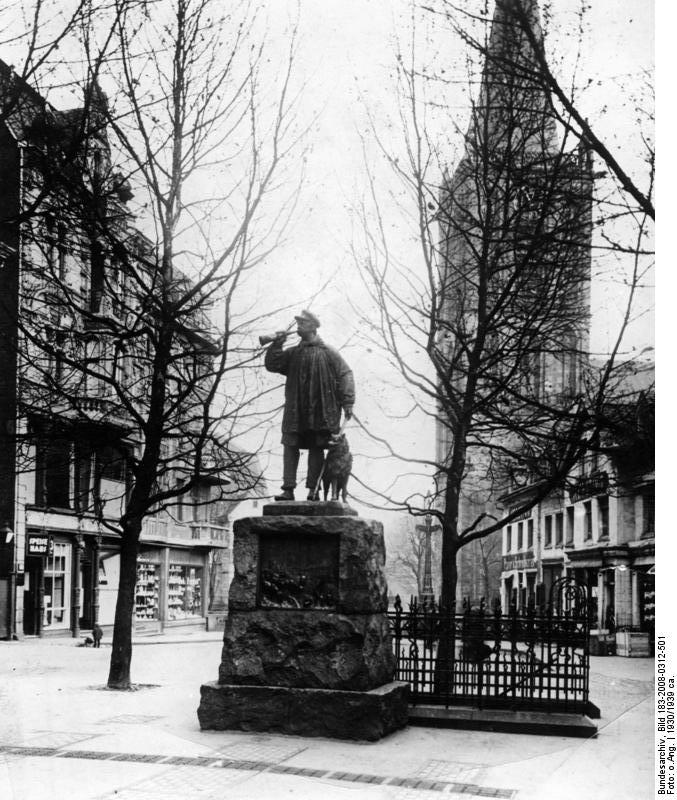 Bochum, Kuhhirten-Denkmal [Bochum.- Kuhhirten-Denkmal (dargestellt Fritz Kortebusch mit seinem Hund, letzter Kuhhirte von Bochum)]